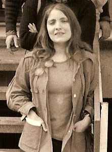 Michèle Bernard en juin 1978